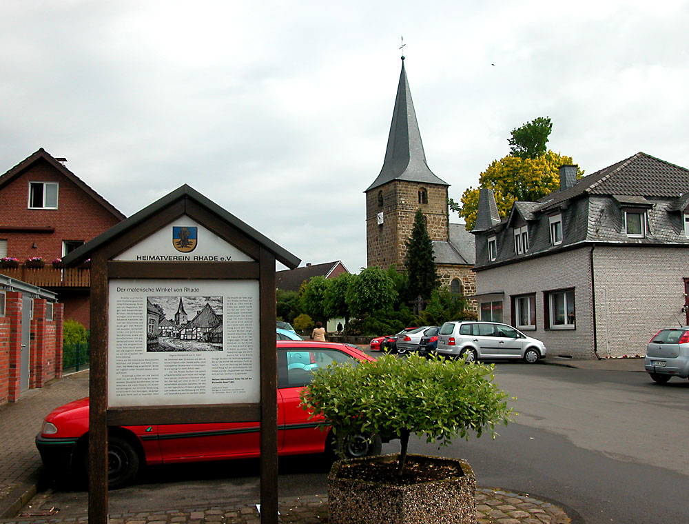 Infotafel „Der malerische Winkel von Rhade“ im Zentrum von Rhade, Dorsten; im Hintergrund die St.-Urbanus-Kirche